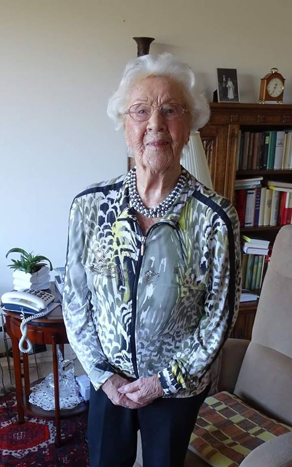 Mien Schopman-Klaver in januari 2016.